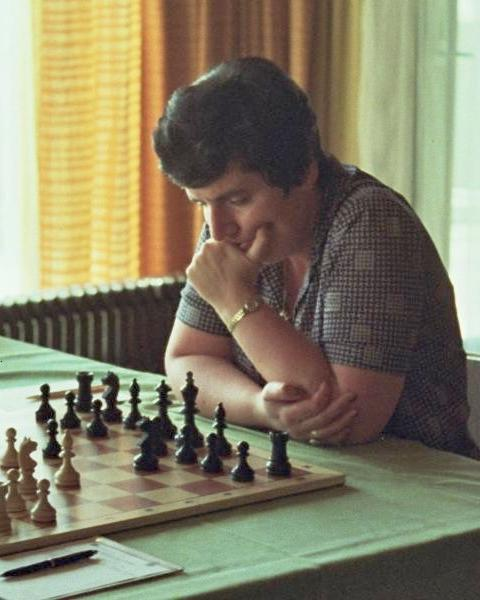 Nona Gaprindaschwili 1982 in Bad Kissingen